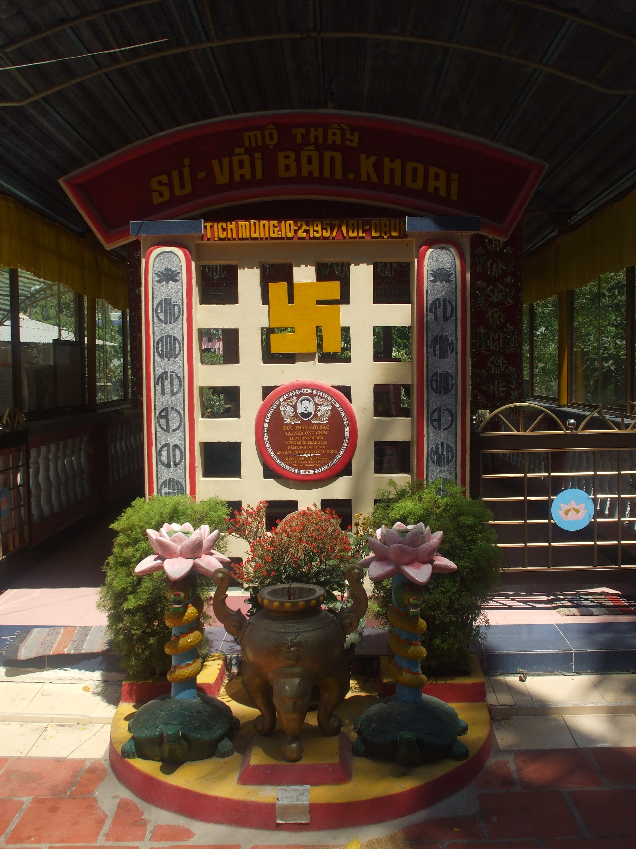 Mộ Sư Vãi Bán Khoai ở Mỏ Cày, Bến Tre, Việt Nam.